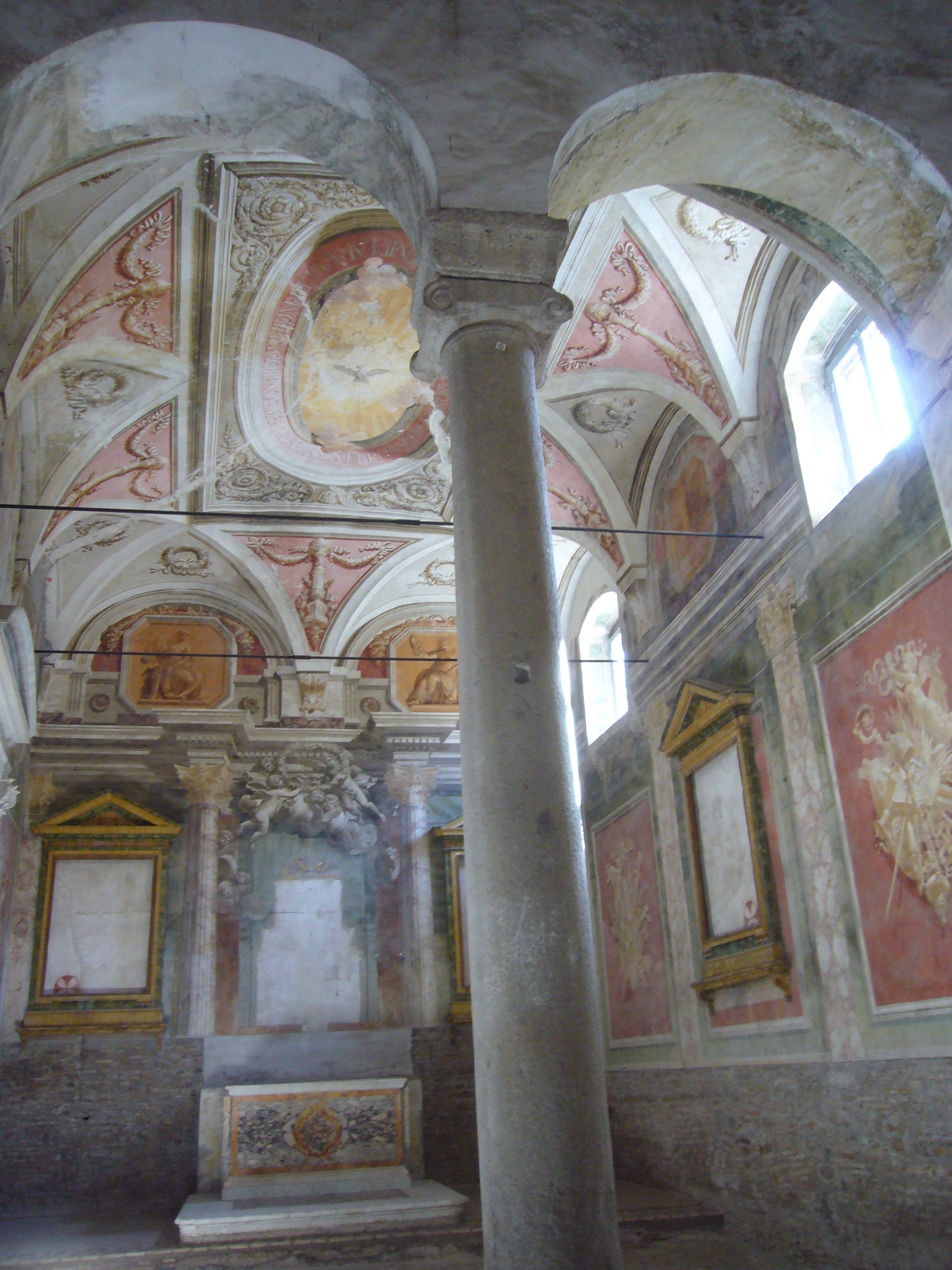 Roma, santo Stefano Rotondo. Cappella di s. Stefano d'Ungheria